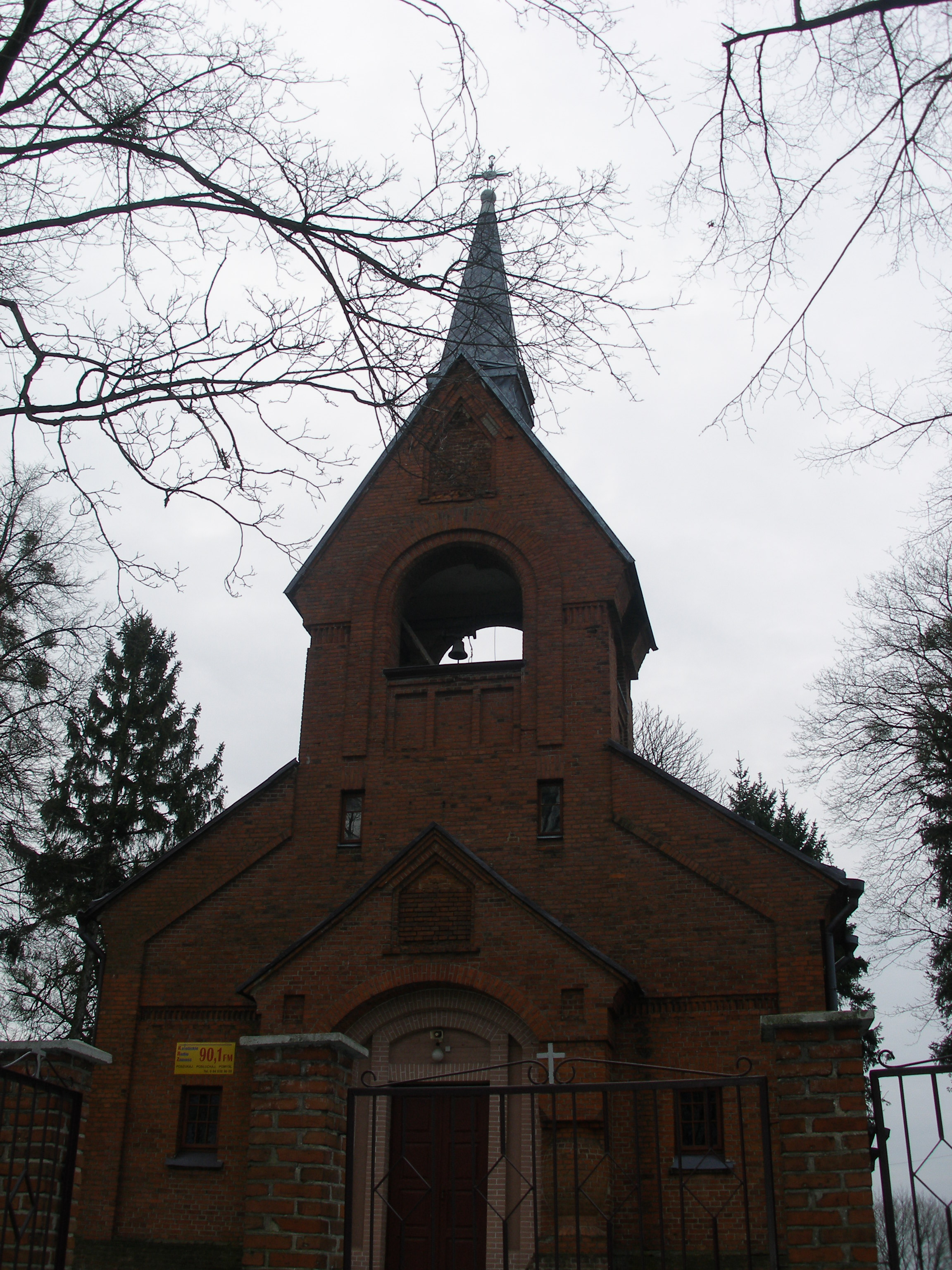 Łaziska - dawna cerkiew prawosławna z 1910, obecnie kościół parafialny p.w. Niepokalanego Serca NMP (zabytek nr A/466 z 24.03.1989)